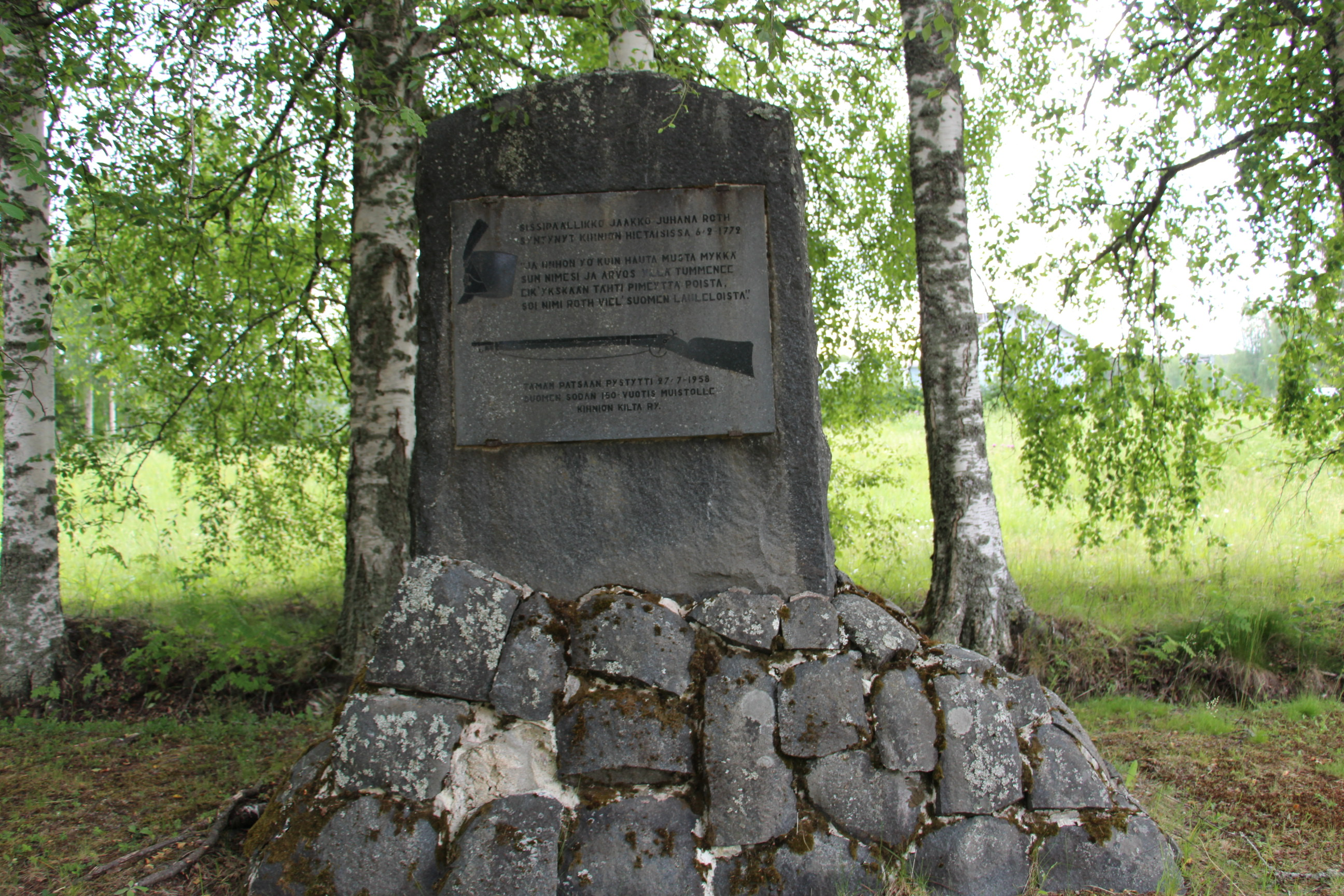 Jaakko Juhana Rothin muistomerkki Kihniössä, esinemuseon pihassa